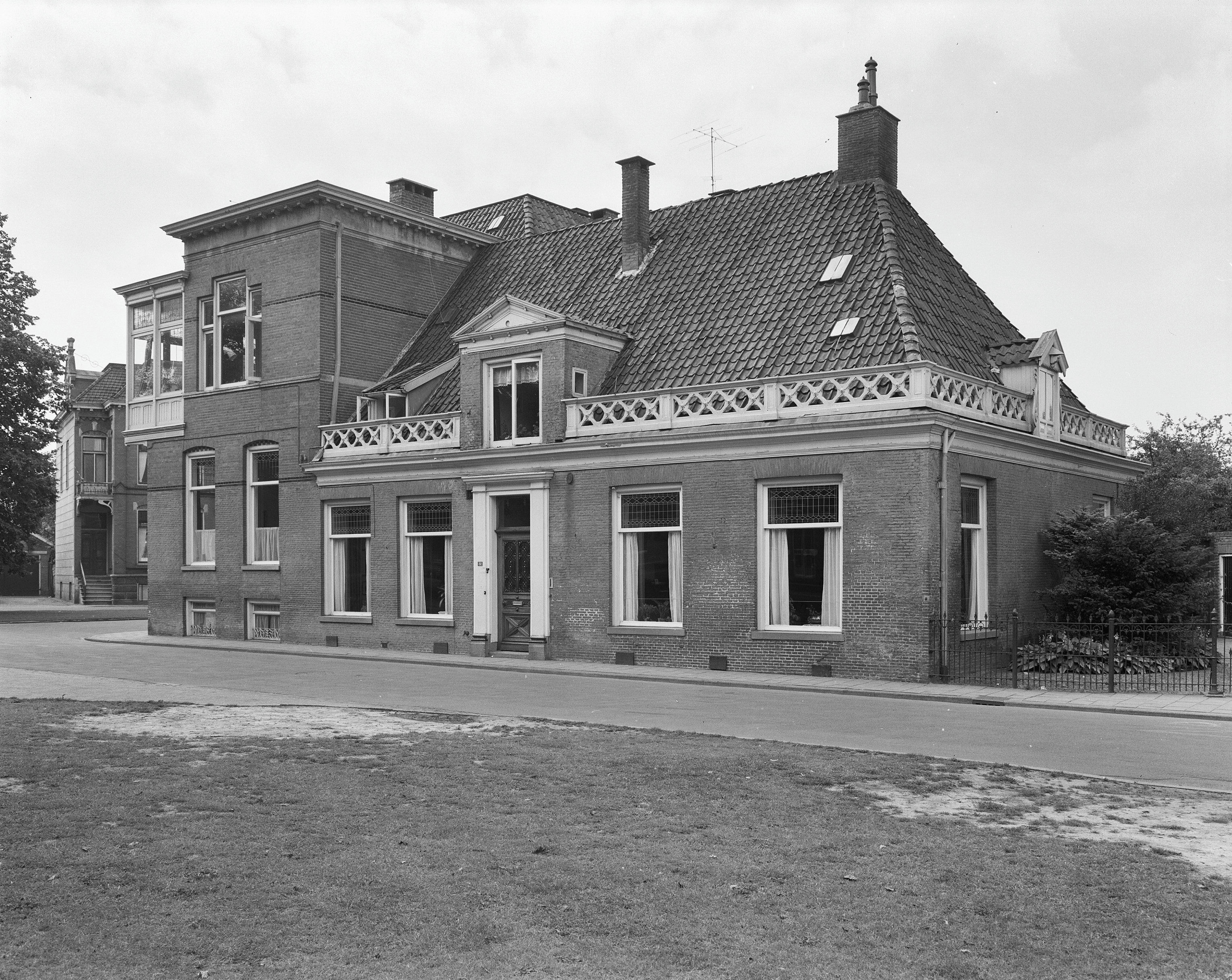 Woonhuizen B: Brink 32, voorgevel